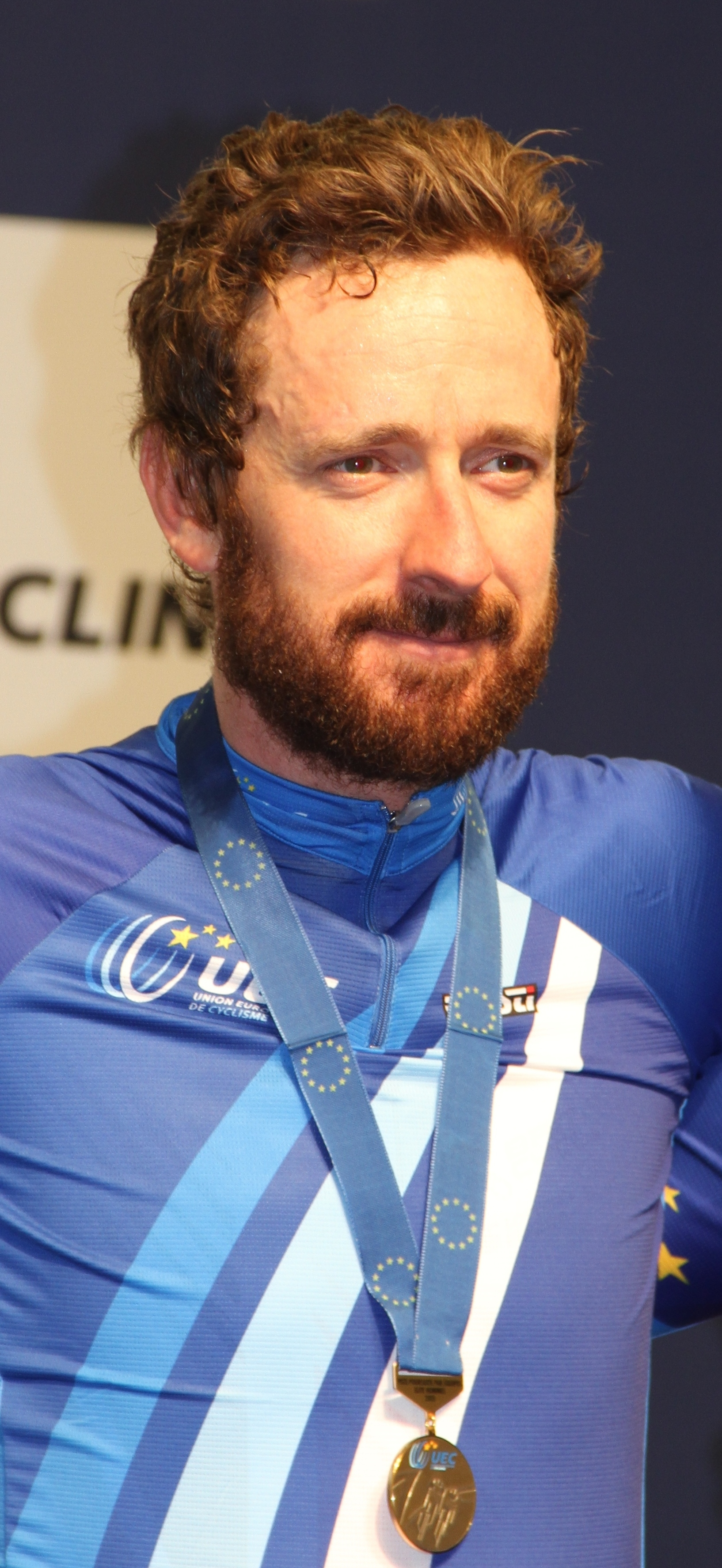 Bradley Wiggins, britischer Radsportler The making of this document was supported by the Community-Budget of Wikimedia Germany.